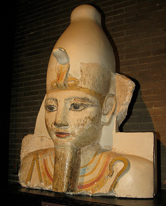 Fragment d'une statue colossale découverte à Abydos (Temple-portail de Ramsès II) - XIXe dynastie - Penn Museum